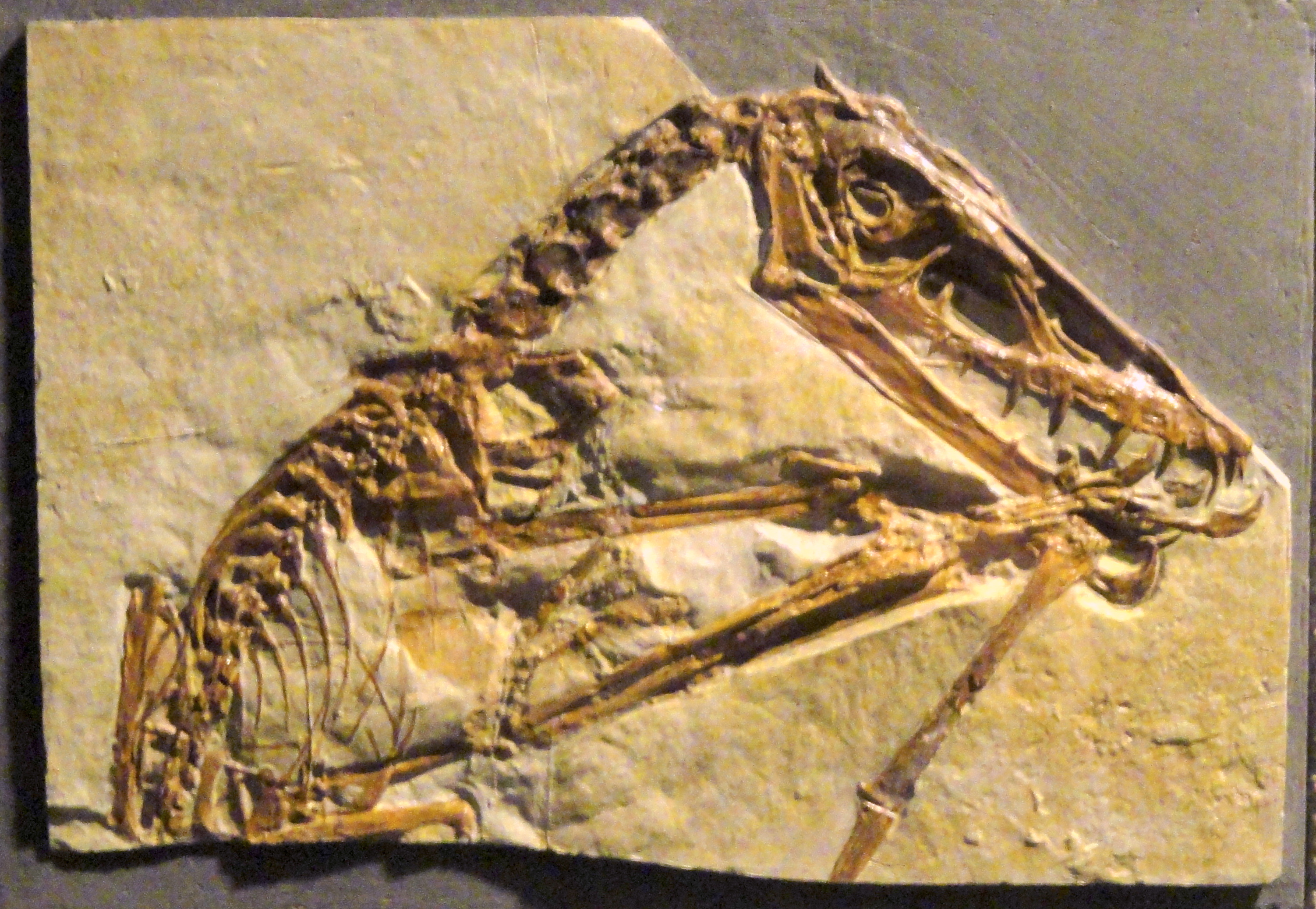 Exhibit in Naturmuseum Senckenberg, Frankfurt am Main, Germany.